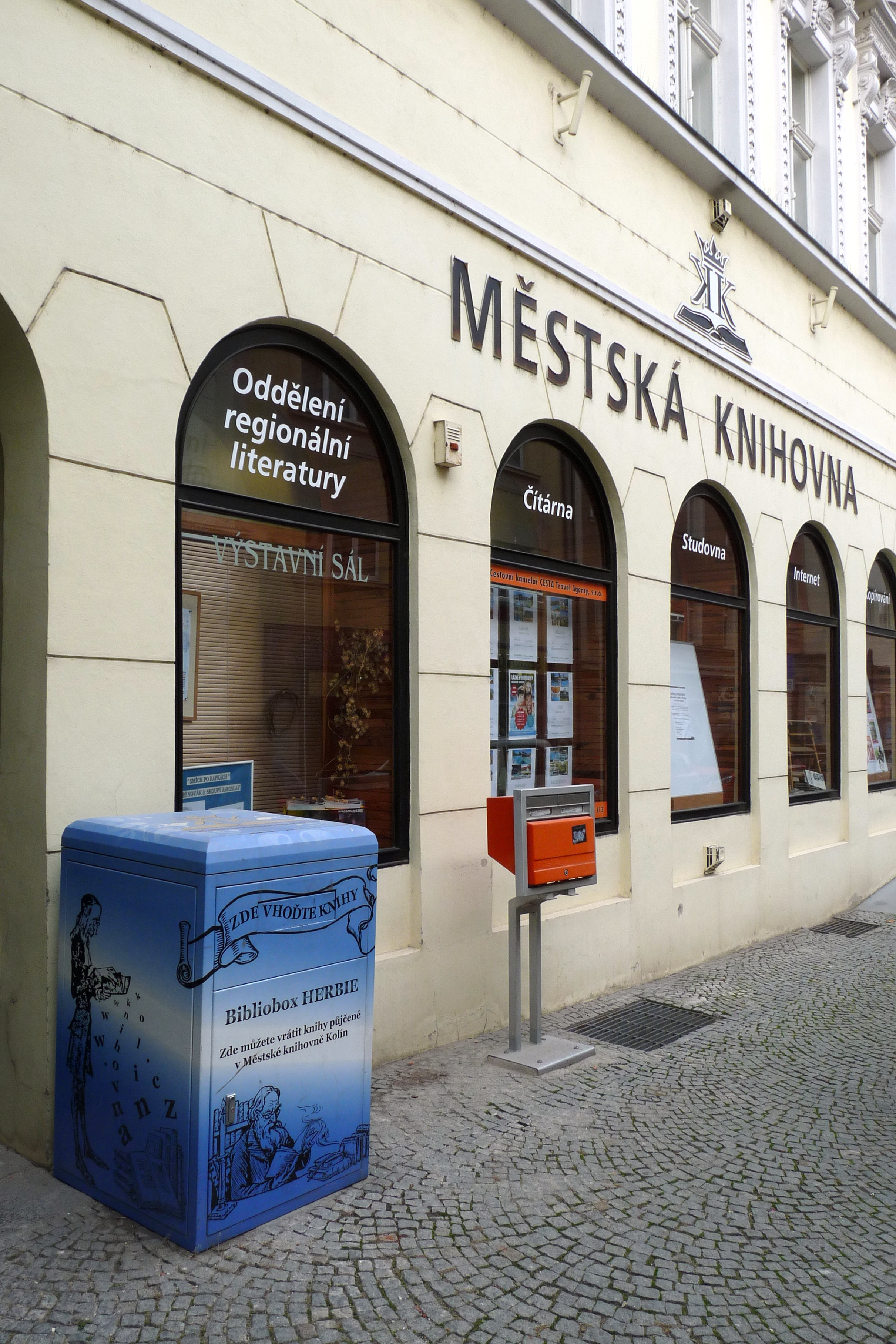 Městská knihovna Kolín